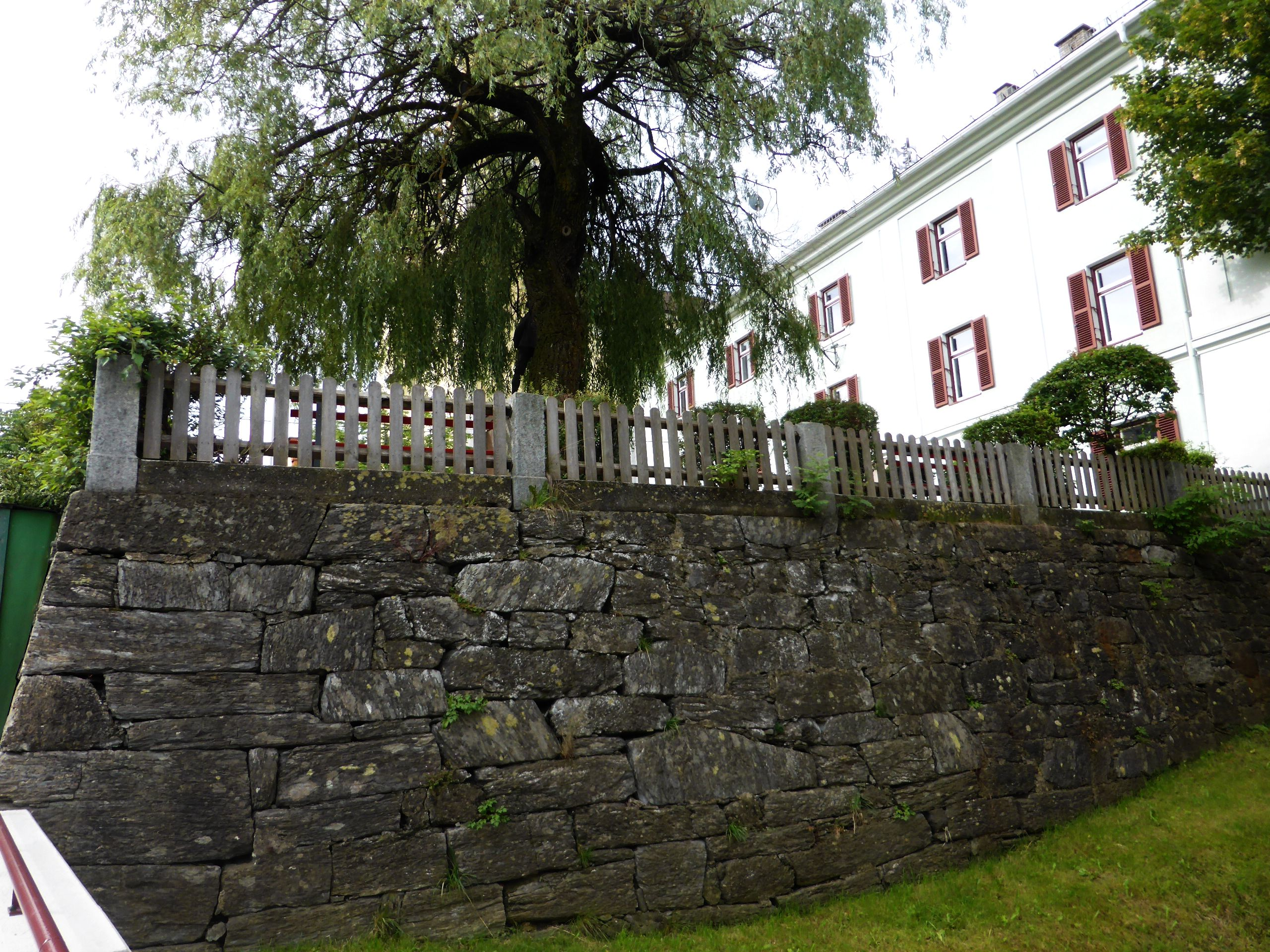 Polizeigebäude, ehem. Bezirksgericht